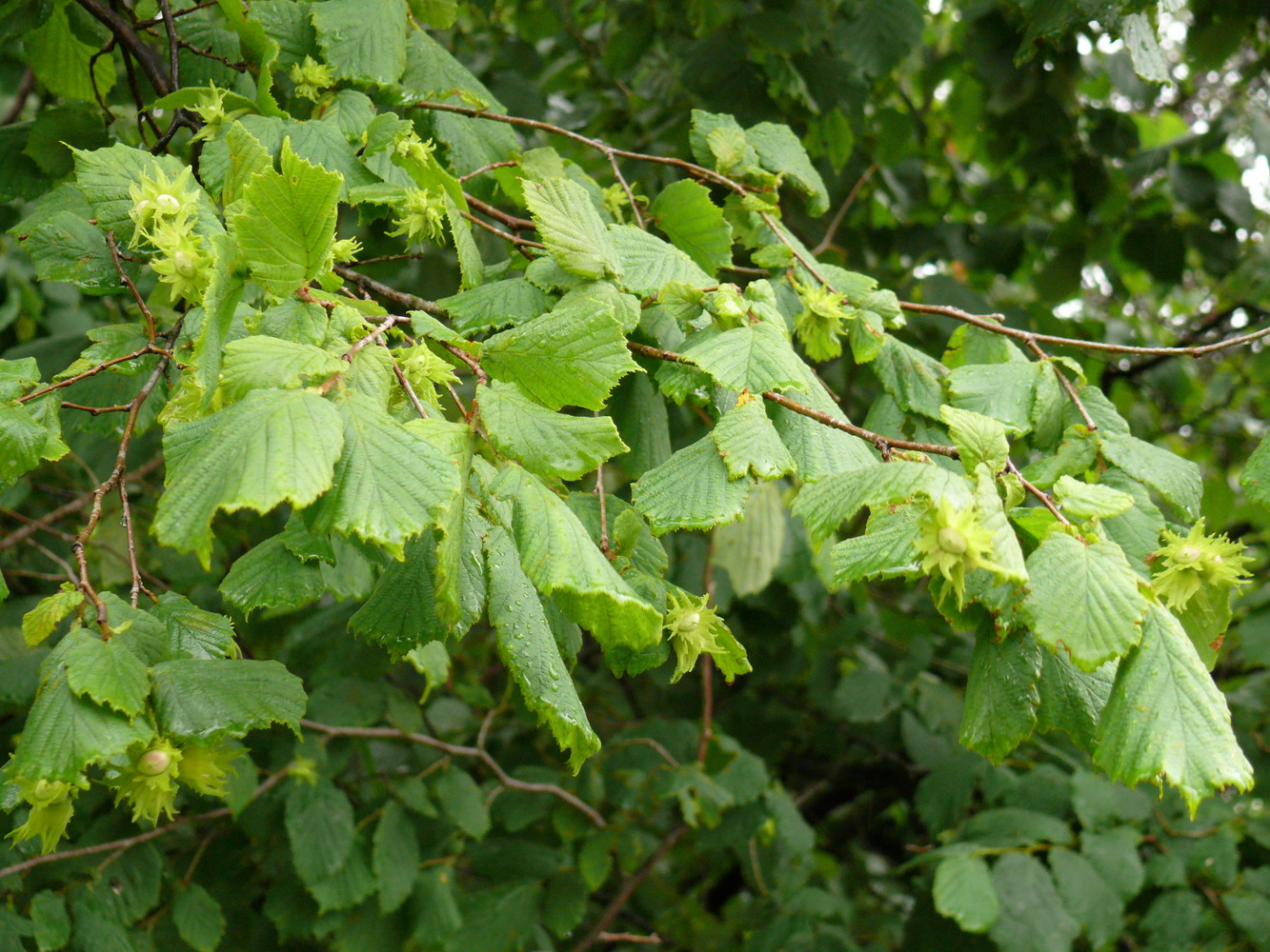 Ліщина